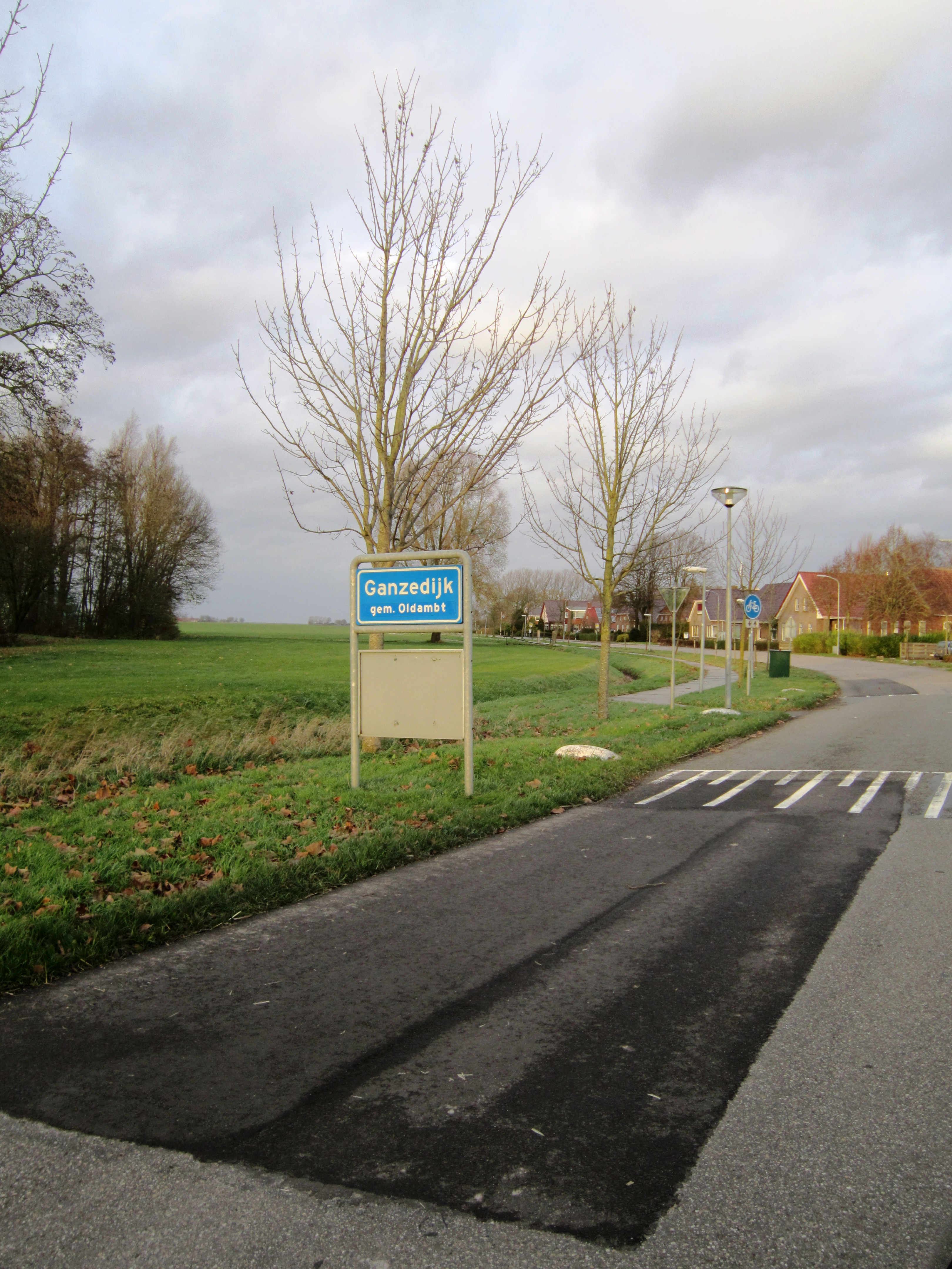 plaatsnaambord Ganzedijk